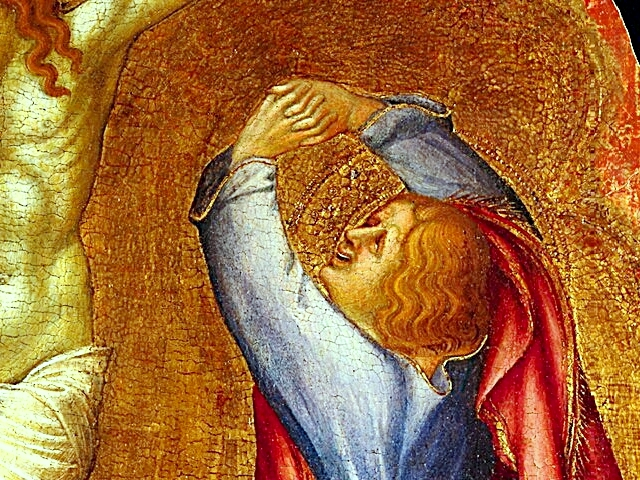 detail